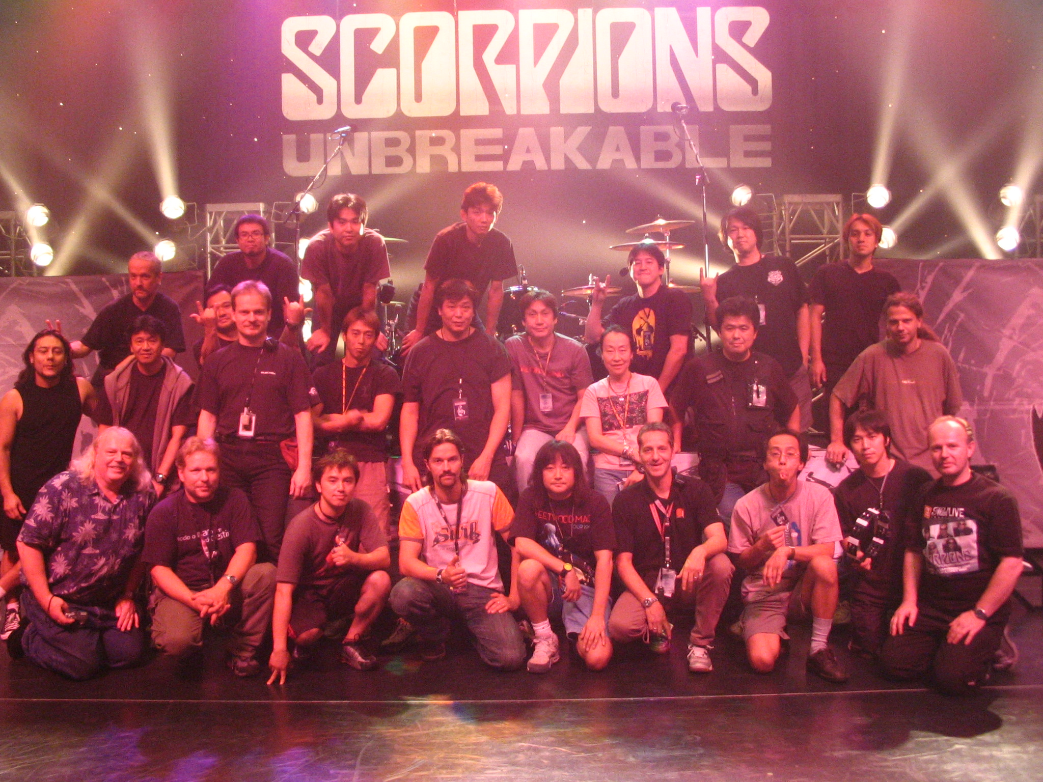 Mit der japanischen und europäischen Scorpions Crew in Tokyo (2004) (untere Reihe, 4.v.l.)